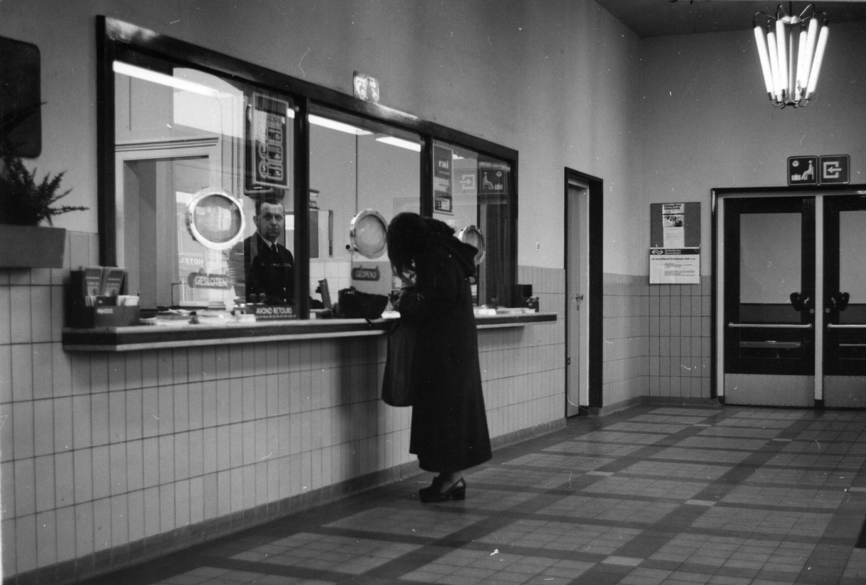 Interieur van het N.S.-station Delfzijl te Delfzijl: hal en loketten.